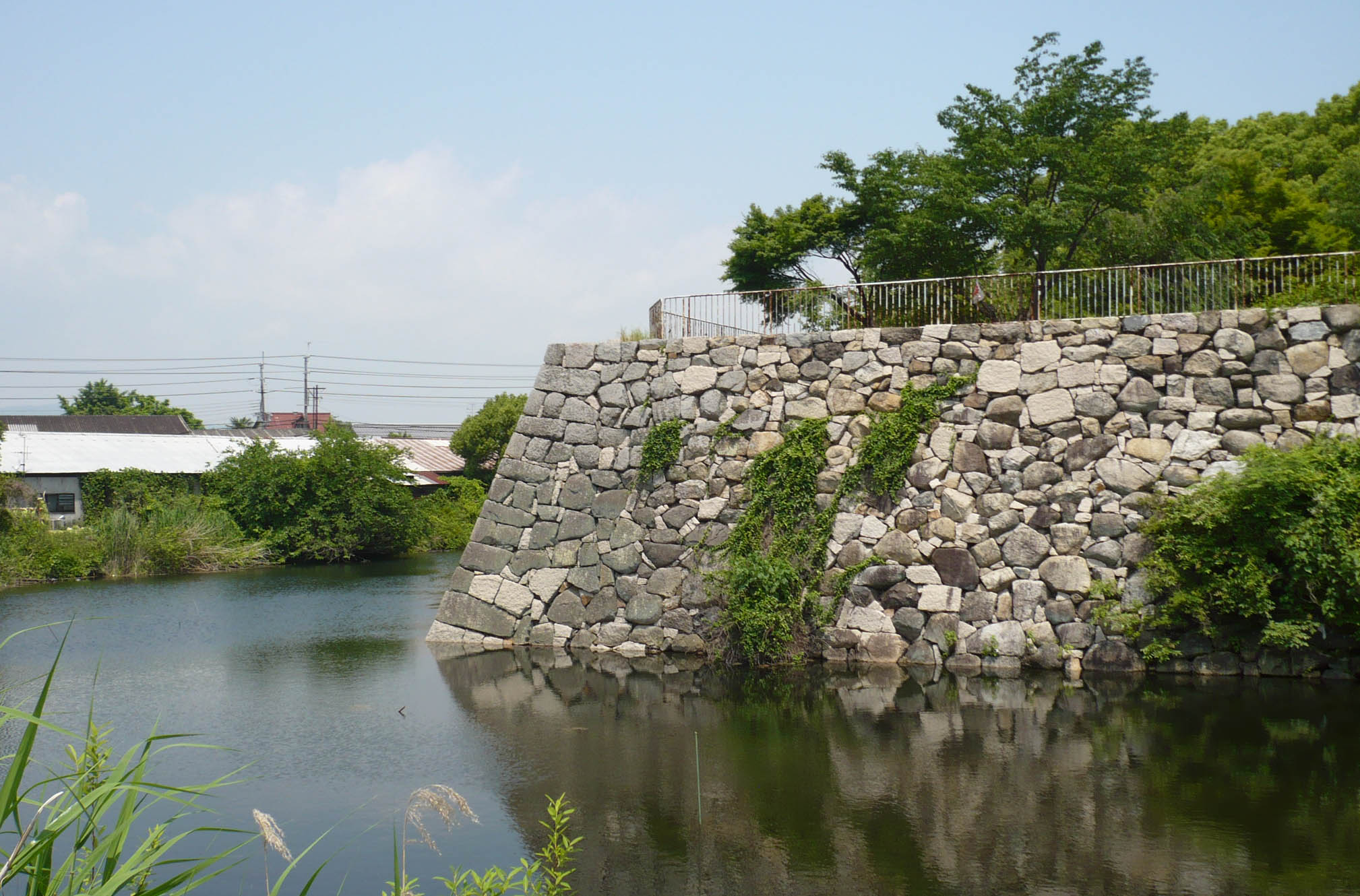 堀跡